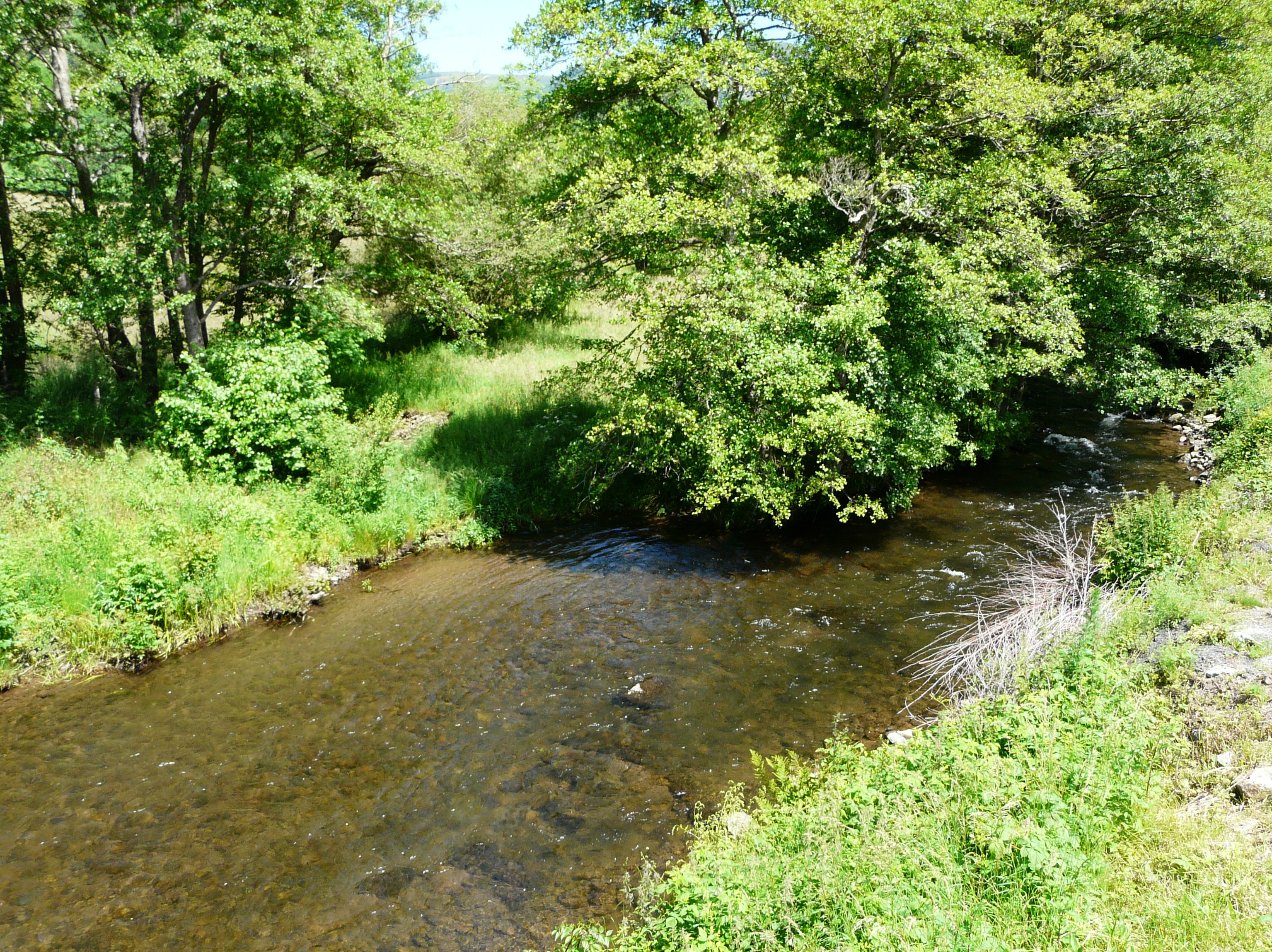 Le Brezons en amont du pont de la route départementale 57, commune de Brezons, Cantal, France.